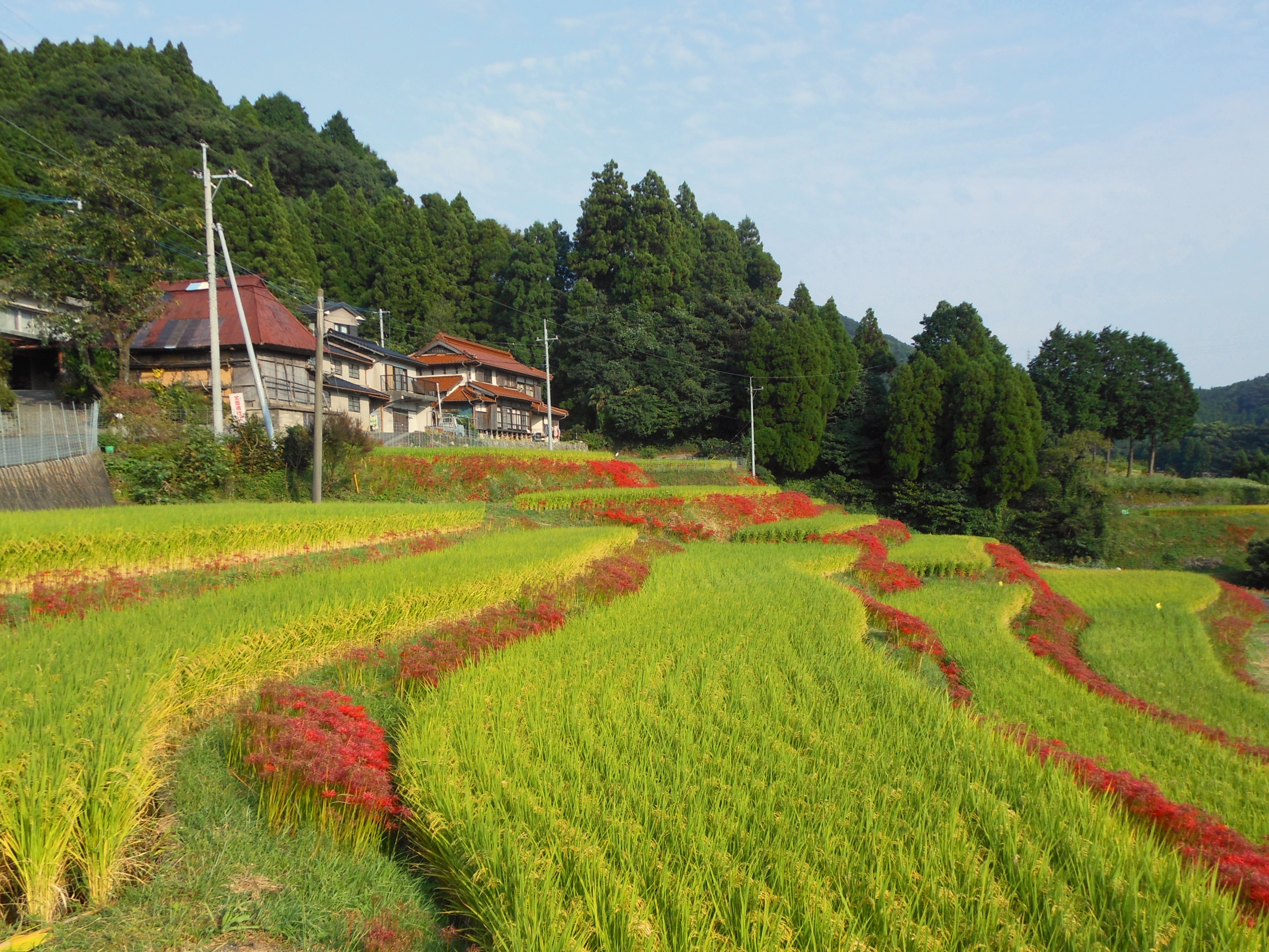 佐賀県小城市の江里山の棚田にて、民家と棚田の風景。赤い花は彼岸花。